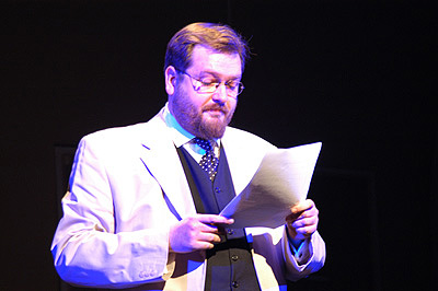 Martin Haidinger